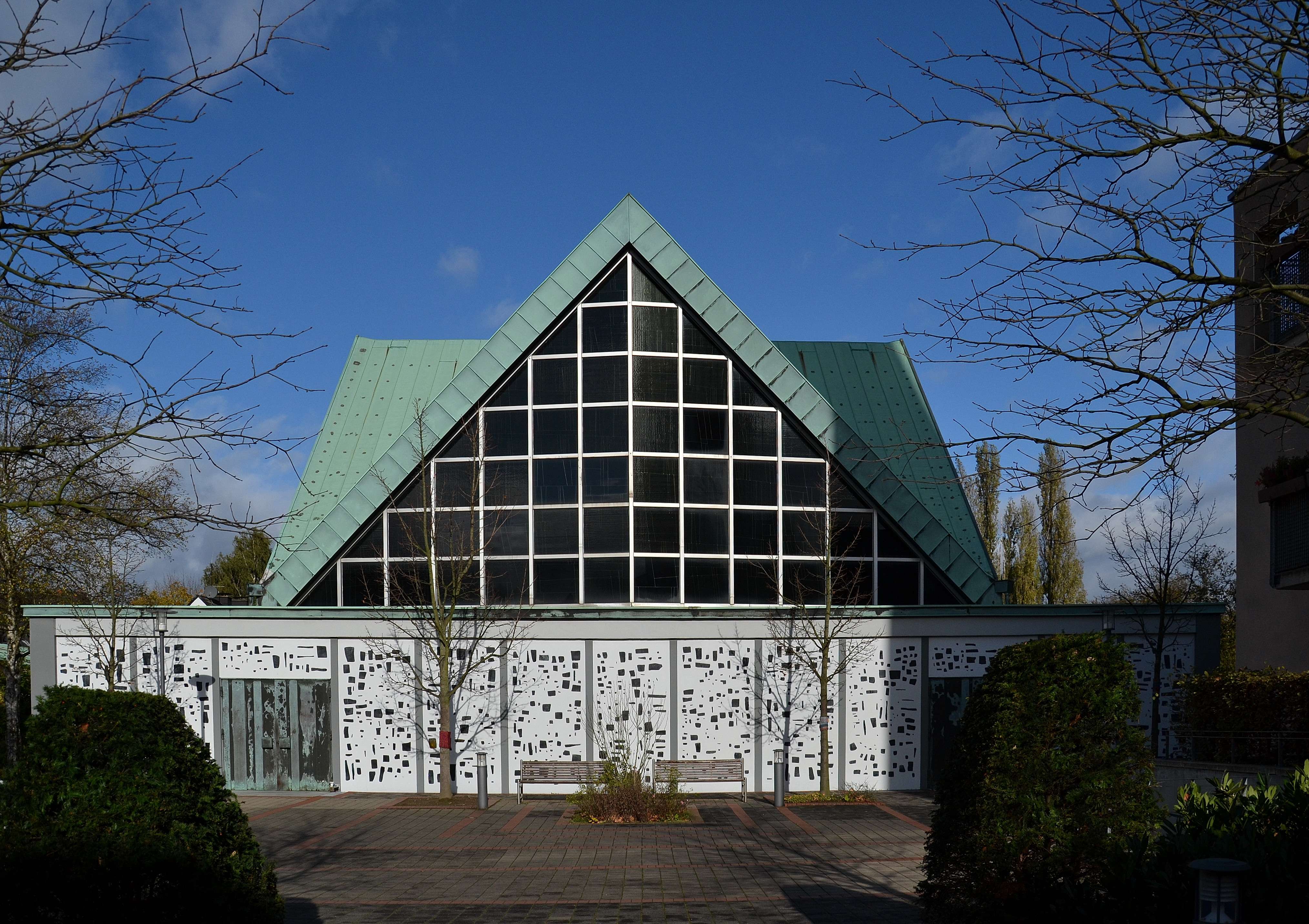 Markuskirche in Essen-Frohnhausen